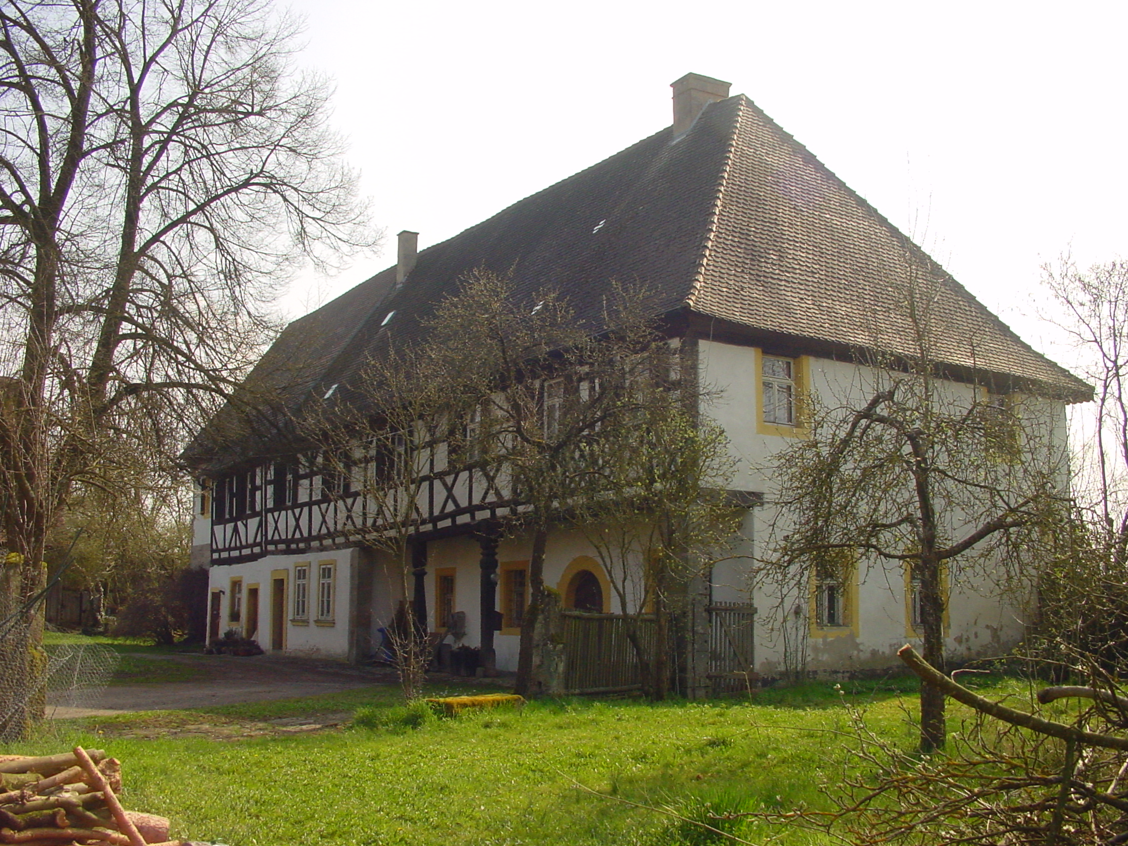 Amtshaus gesehen von Nordwest